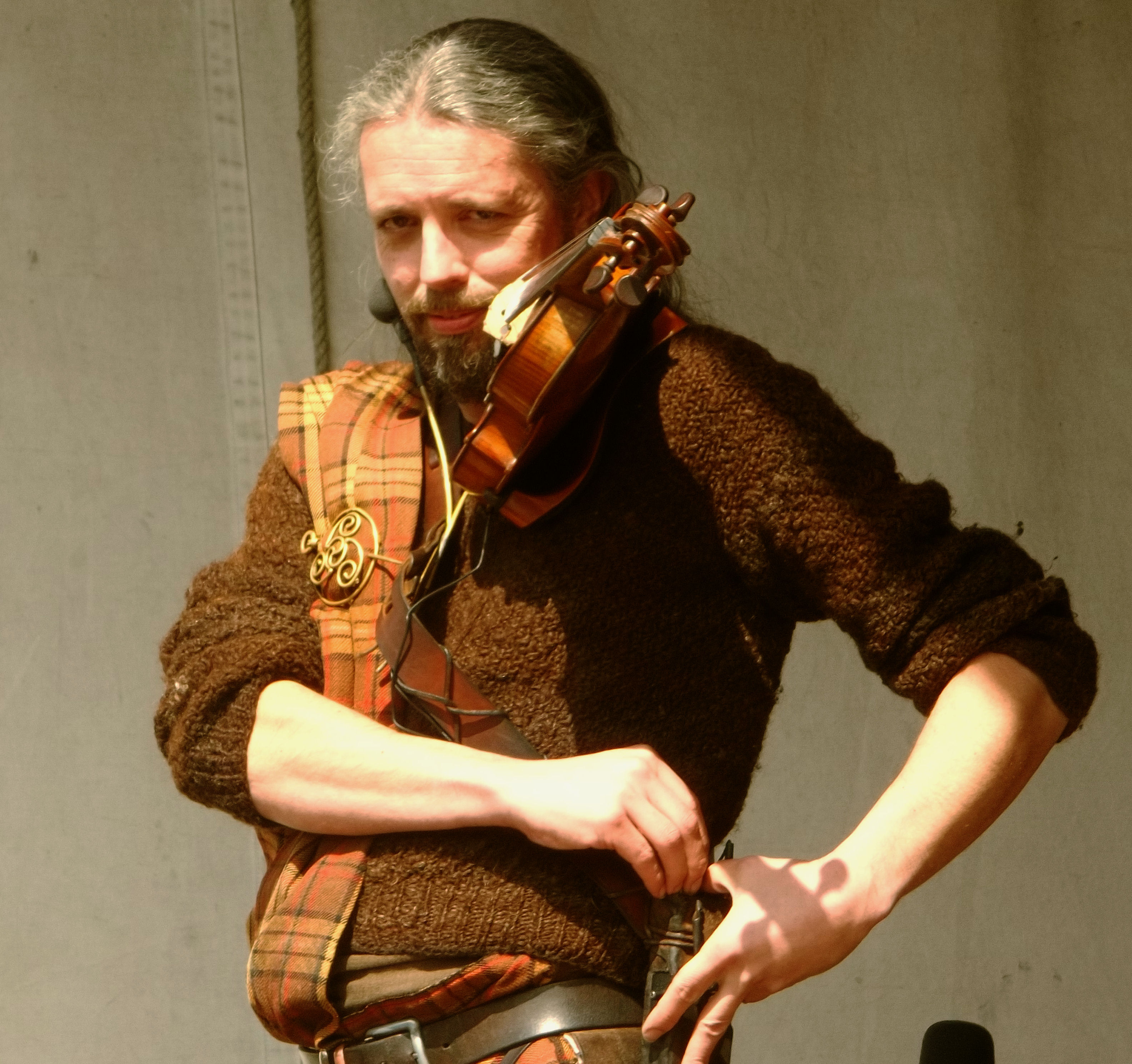 Dieb van Rapalje op Mittelalterlich Phantasie Spectaculum 2012